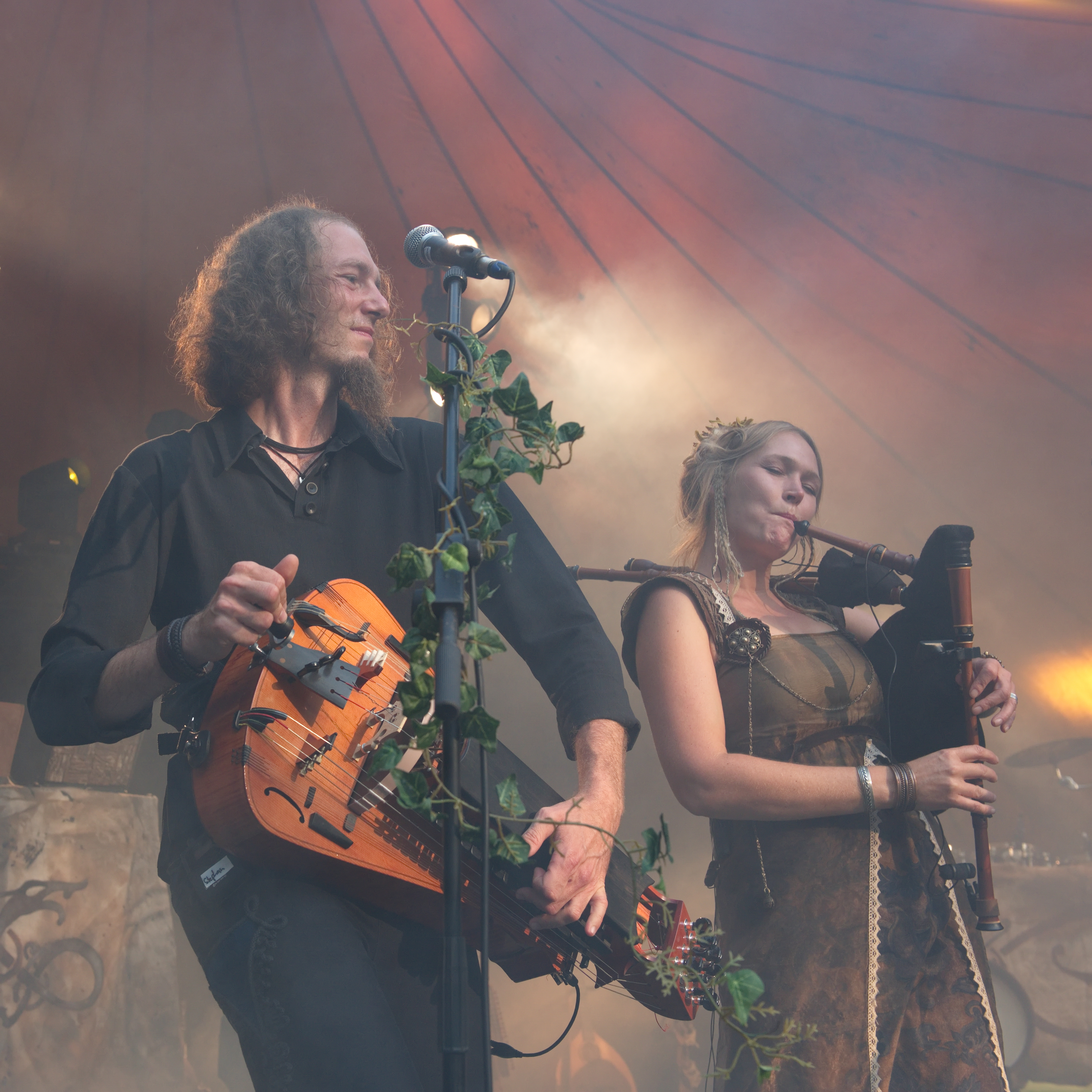 Faun, Feuertal 2016